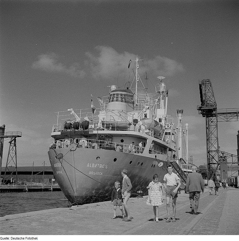 Original image description from the Deutsche FotothekWismar. Seehafen, Schiff Albatros